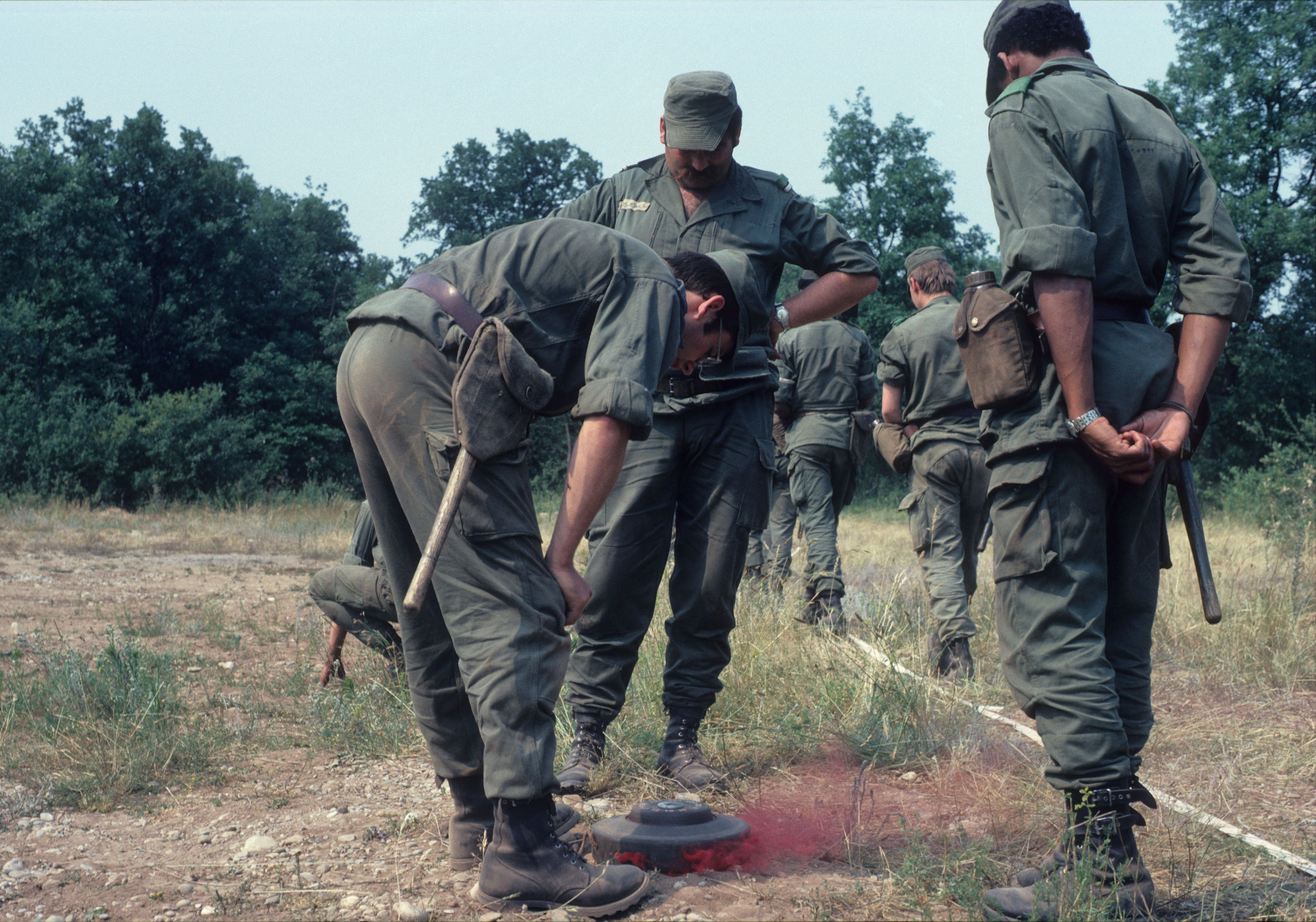 Excercice de minage au Kastenwald. Mine antichar d'exercice. Adjudant Grosjean avec 2e SM Tilmant et Ney. 9/5.